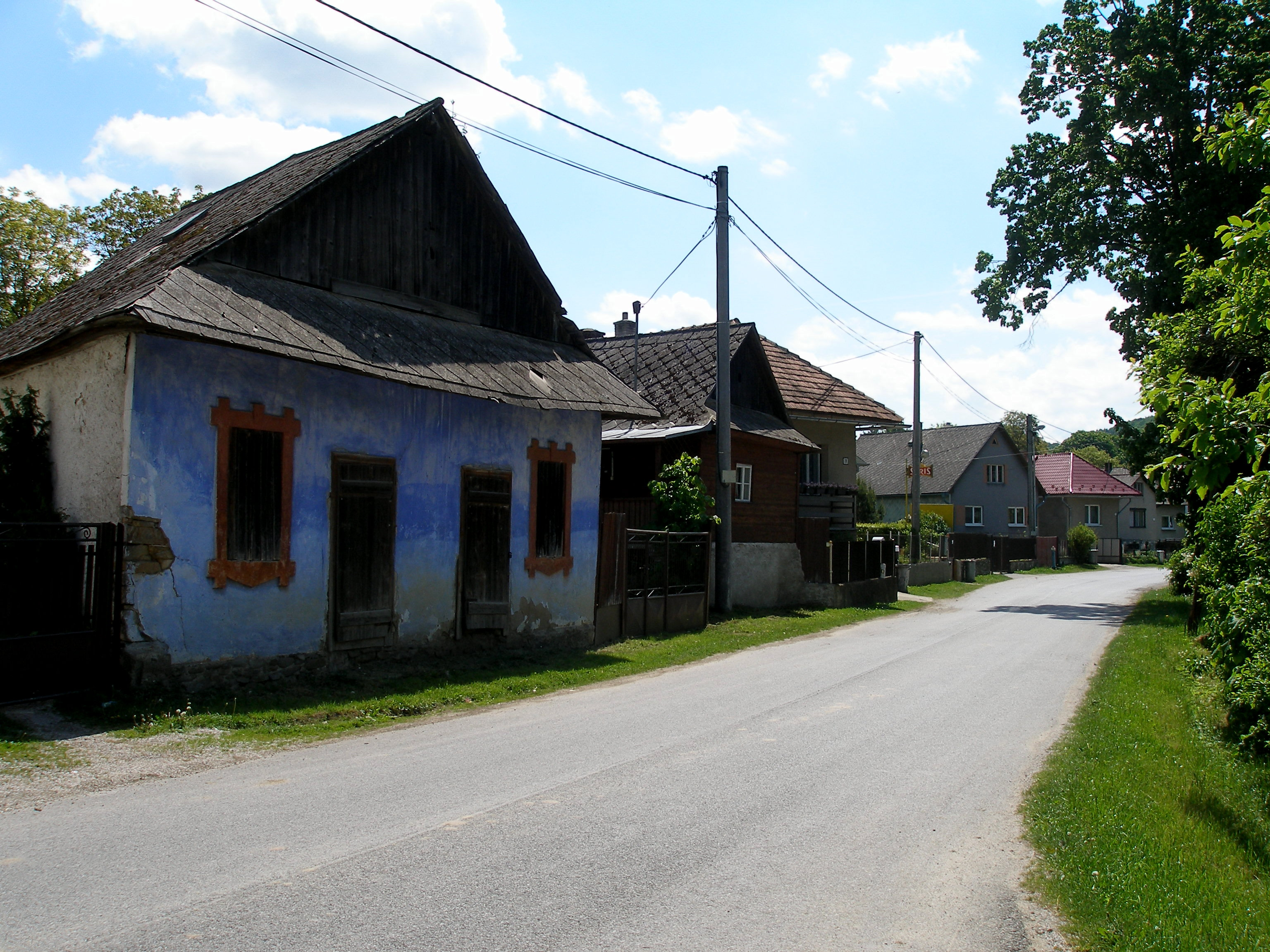 Obec Ľutina okres Sabinov.